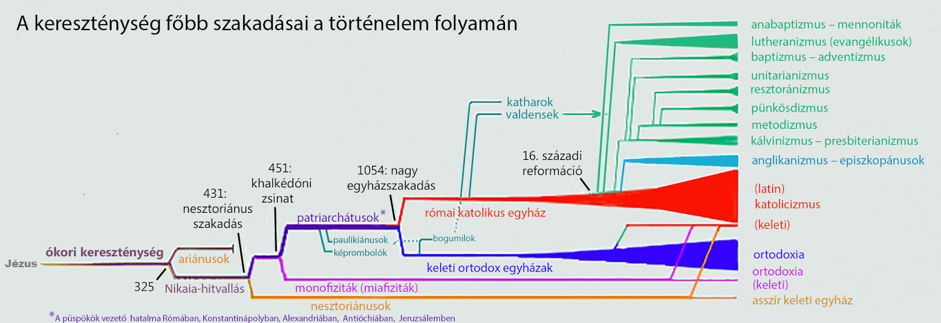 A kereszténység főbb szakadásai a történelem folyamán